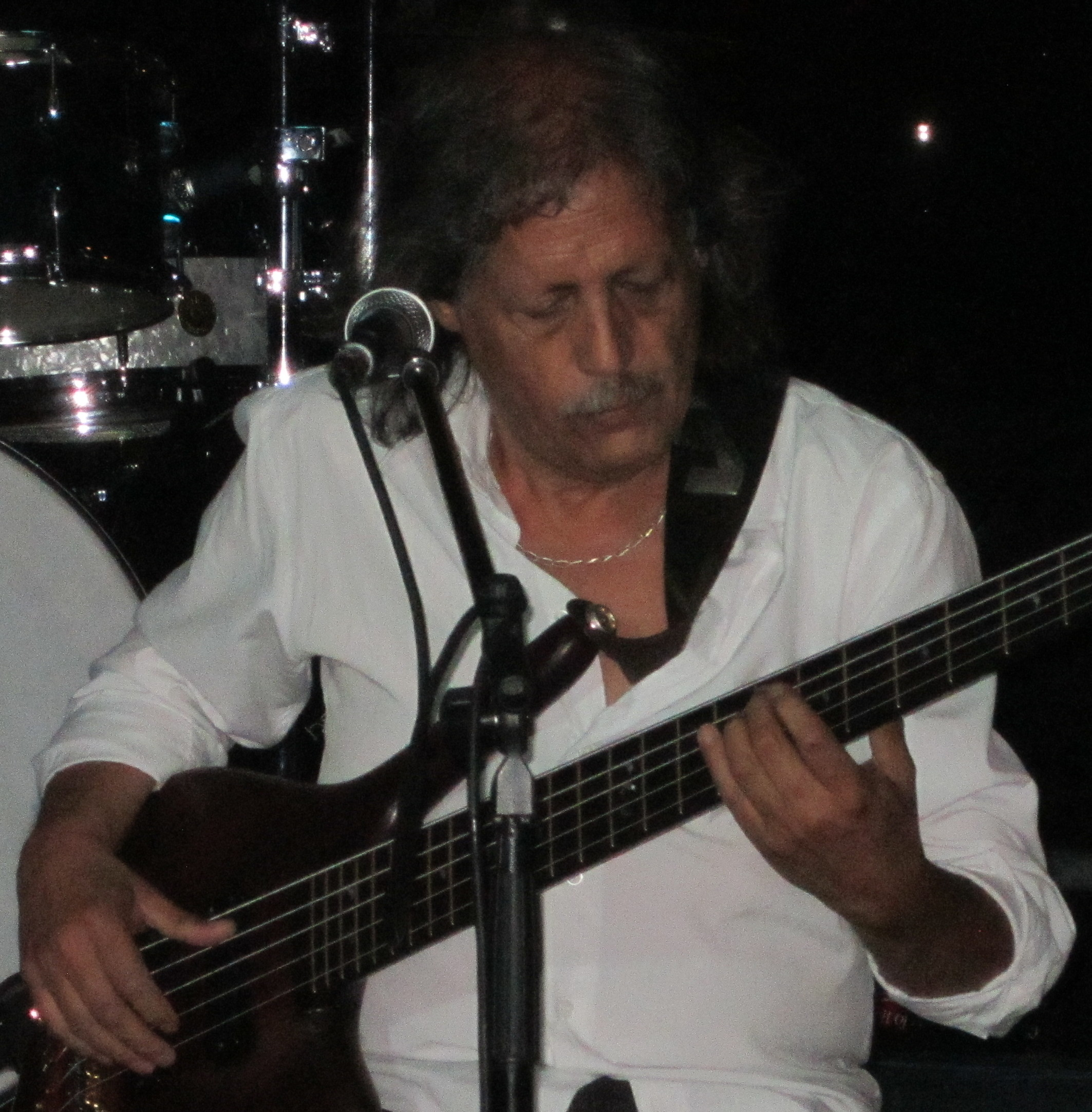 Ernesto Holman en 2015